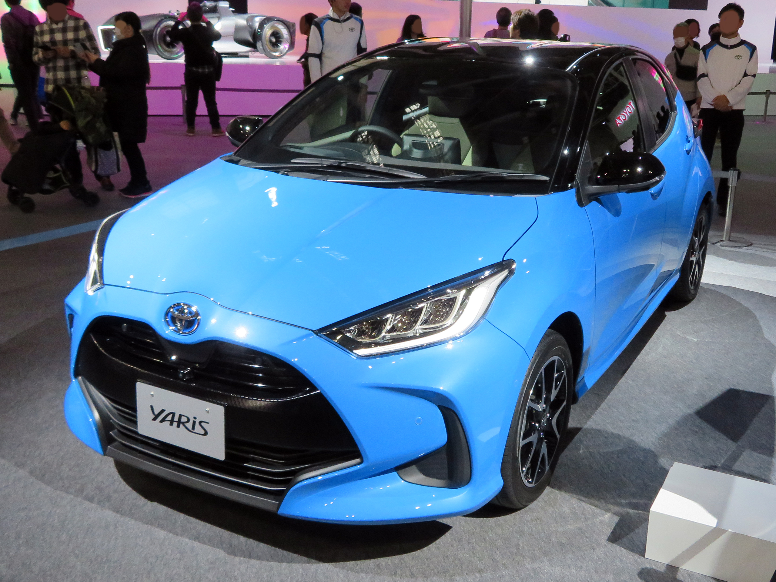 大阪モーターショー2019に於いて6AA-MXPH15-AHXEB型トヨタ・ヤリスHYBRID Z E-Fourを撮影。